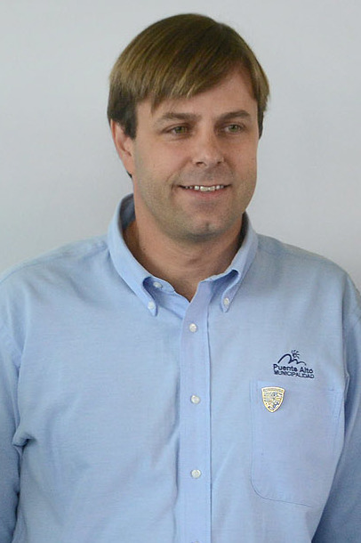 16-04-13 Liceo San Pedro, Puente Alto